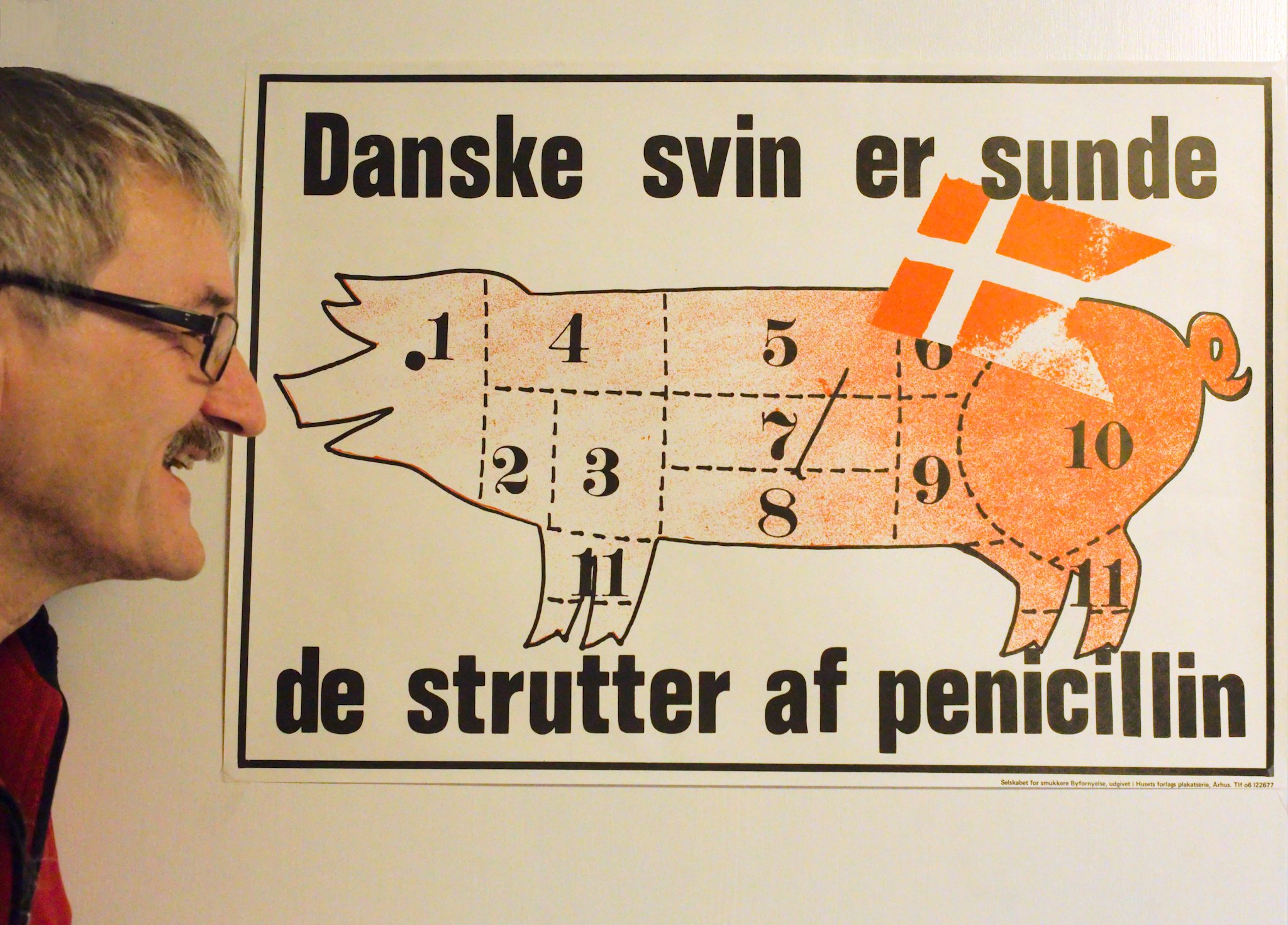 Mikael Witte og penicilin-grisen